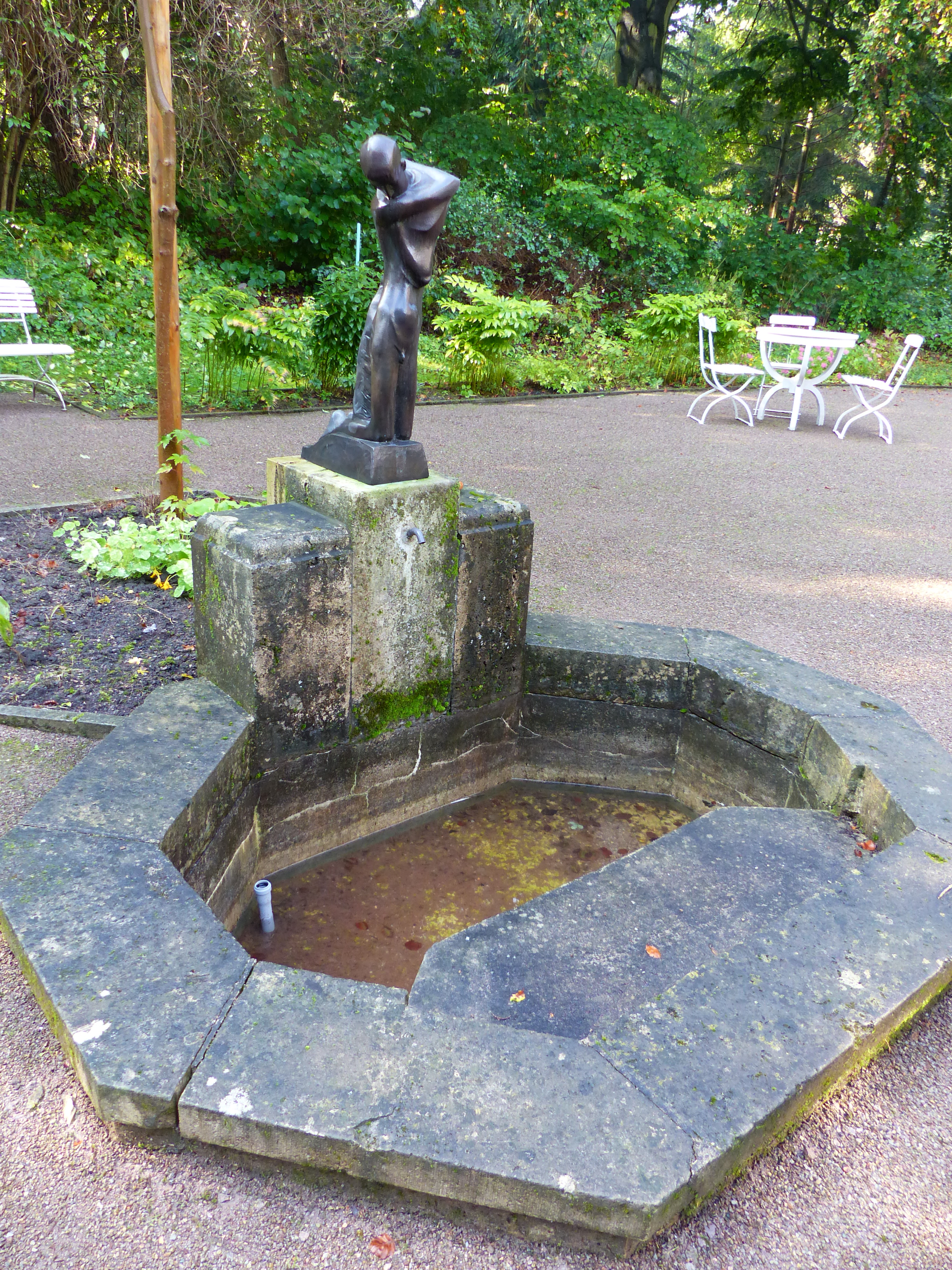 Männlicher Akt, Brunnenfigur von Figur von George Minne, Haus Hohe Pappeln, Belvederer Allee 58, Weimar